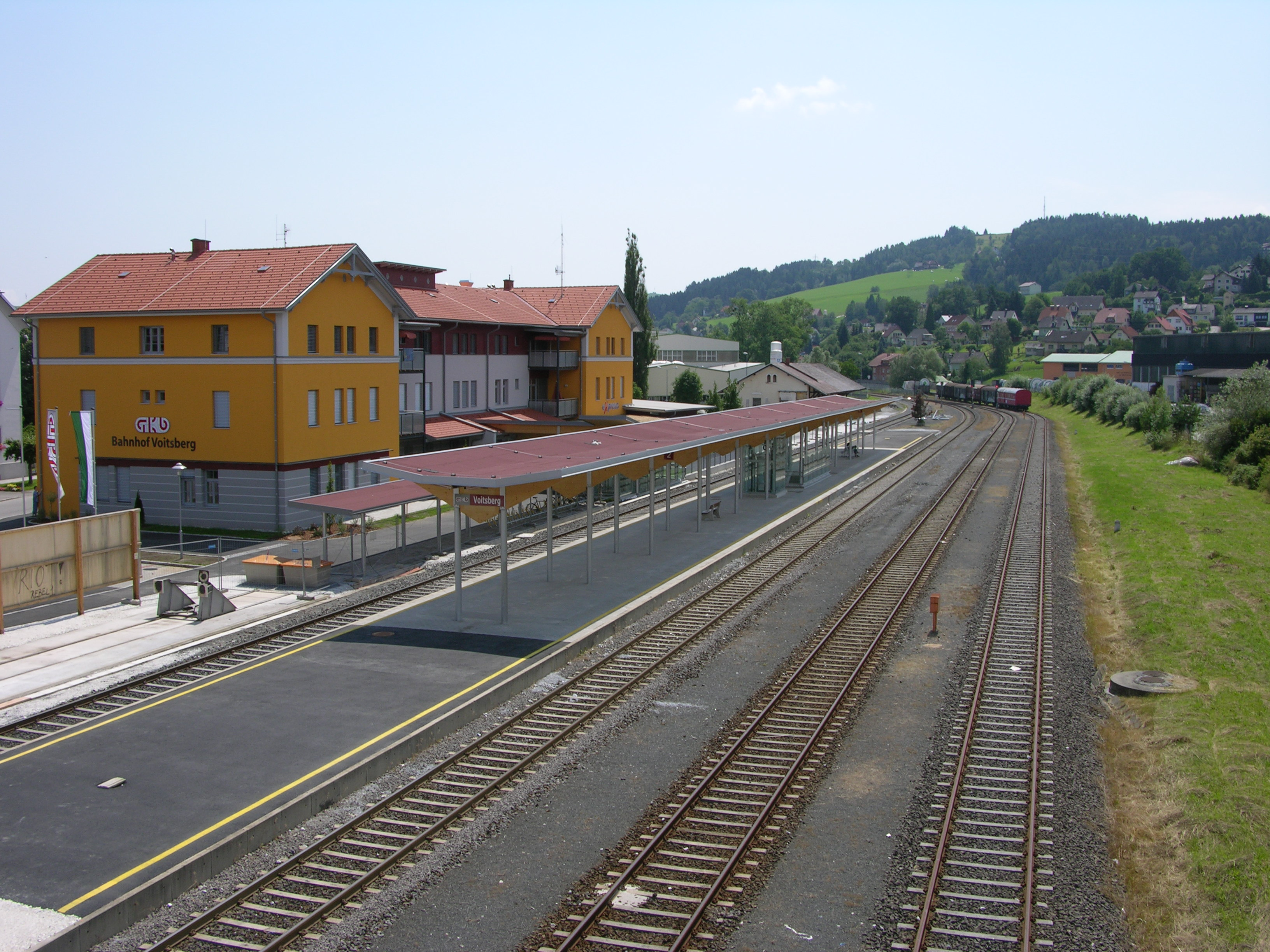 GKB Bahnhof Voitsberg nach Renovierung und Umbau